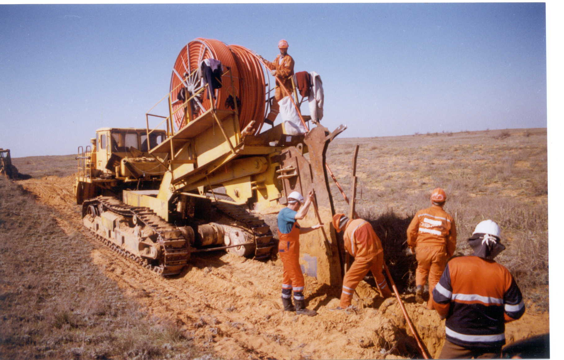 Ein selbstfahrender statischer Verlegepflug beim Verlegen von Leerrohren für Glasfaserkabel